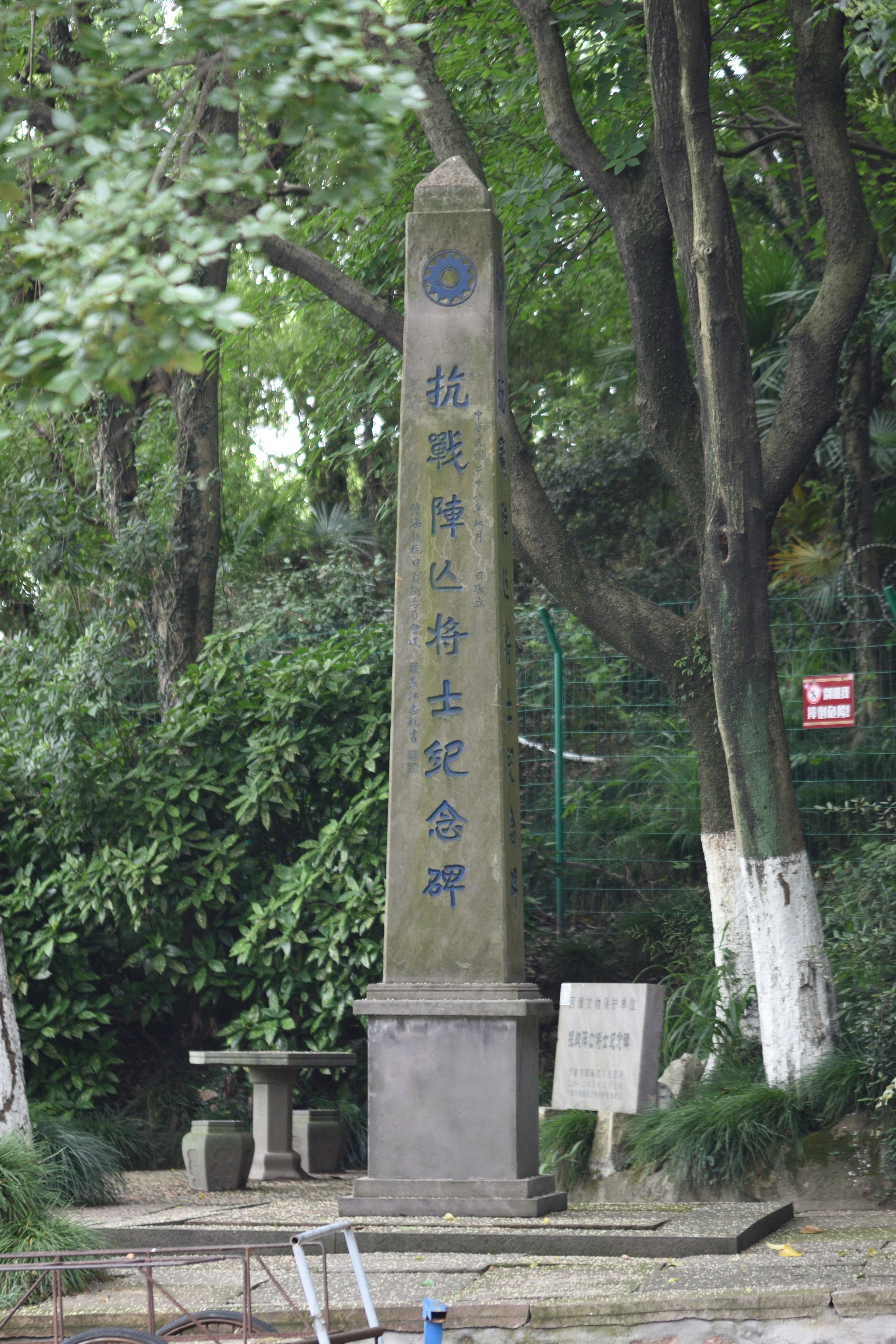 镇海抗战阵亡将士纪念碑